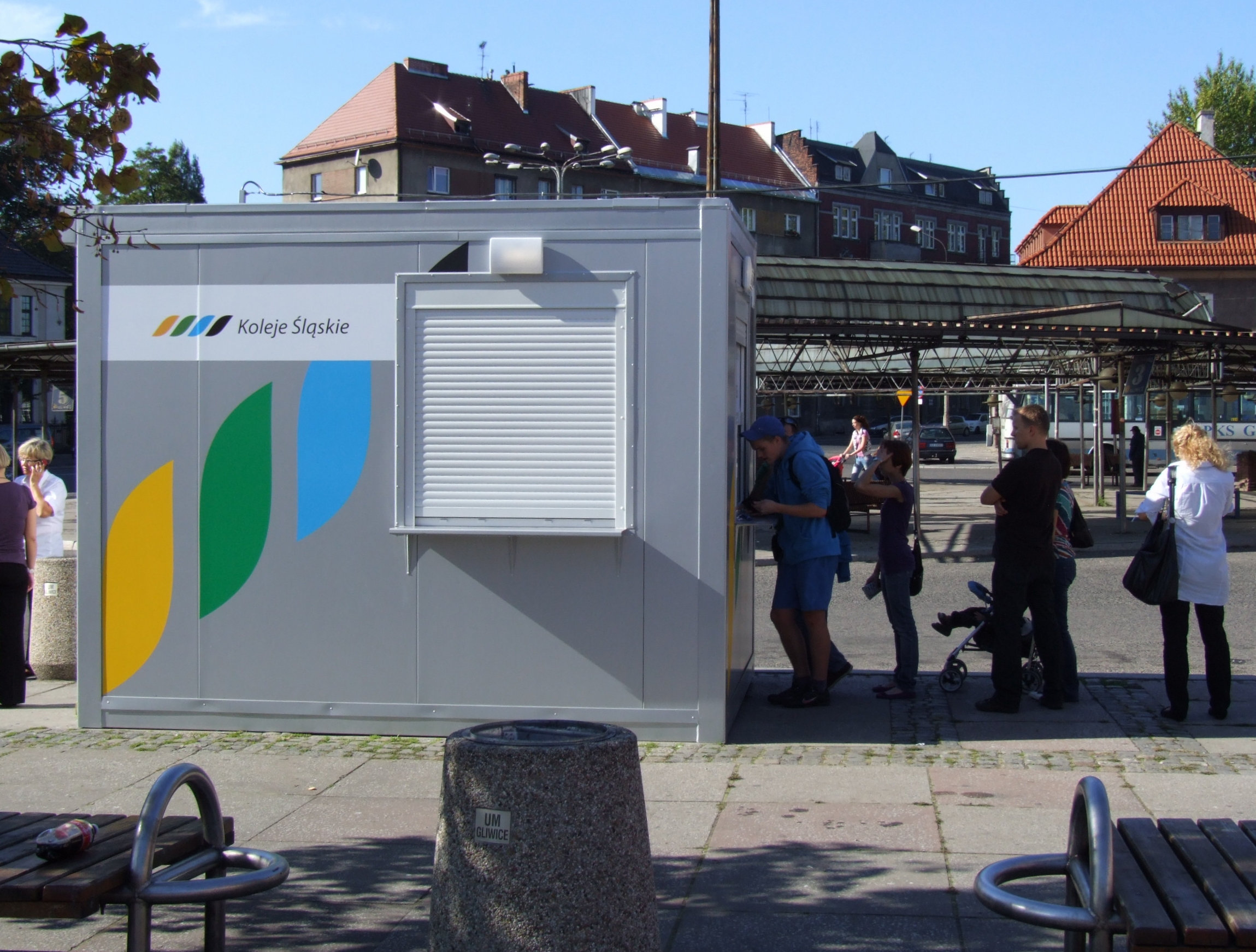 Kasa Kolei Śląskich przed budynkiem dworca w Gliwicach - 1 października 2011, pierwszy dzień działalności